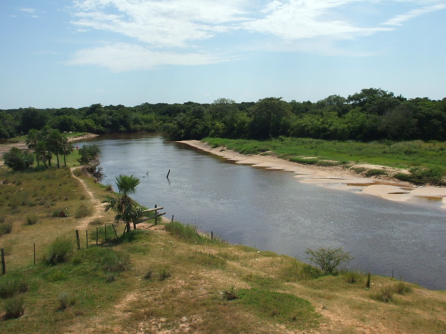 Rio Yhaguy